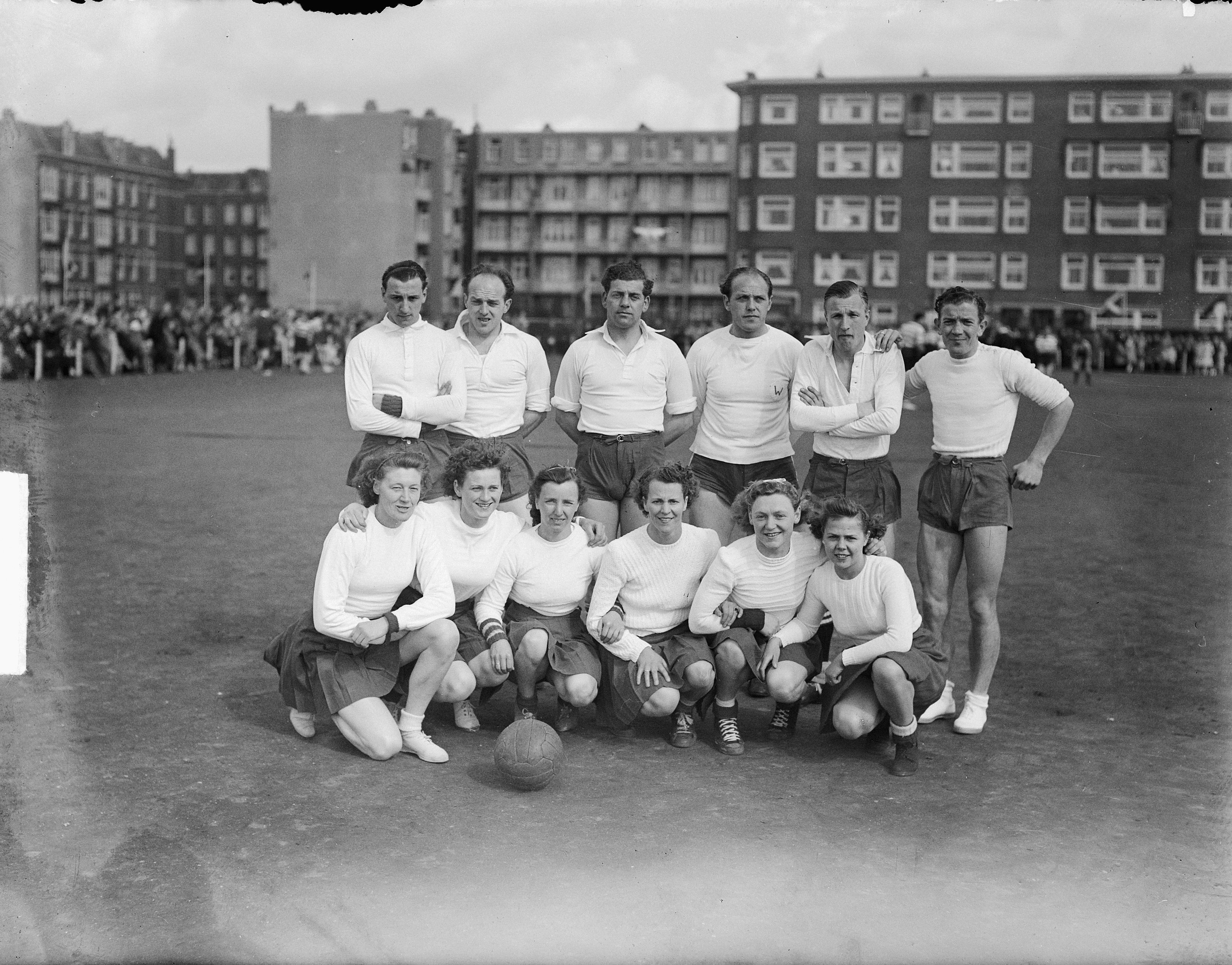 Collectie / Archief : Fotocollectie Anefo Reportage / Serie : [ onbekend ] Beschrijving : Korfbal Blauw-Wit tegen Westerkwartier, Westerkwartier elftal Datum : 2 april 1950 Trefwoorden : KORFBAL, elftallen Instellingsnaam : Blauw-wit Fotograaf : Nijs, Jac. de / Anefo Auteursrechthebbende : Nationaal Archief Materiaalsoort : Glasnegatief Nummer archiefinventaris : bekijk toegang 2.24.01.09 Bestanddeelnummer : 903-8990